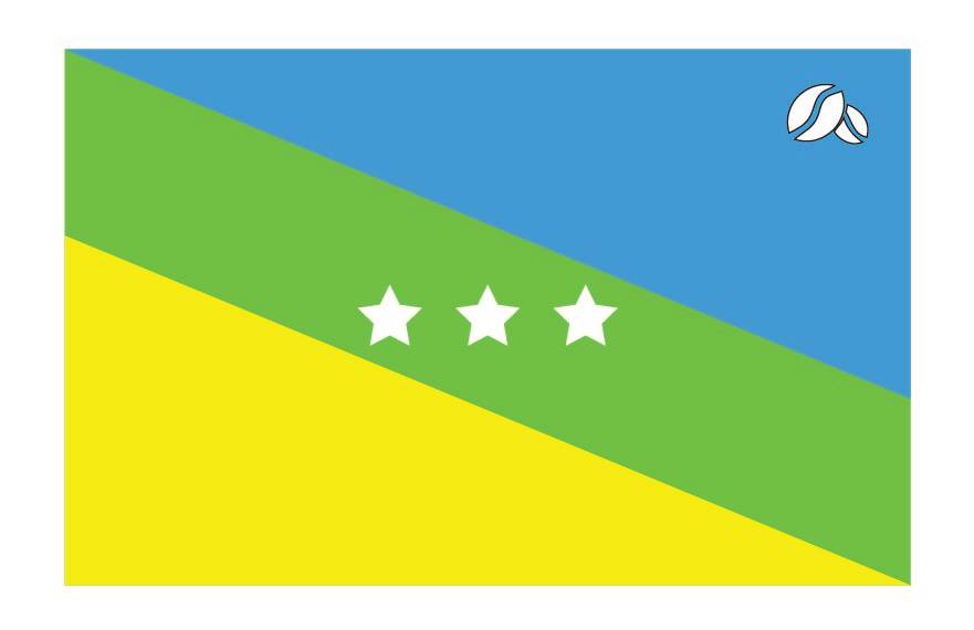 Esta es la bandera del municipio Bolívar del estado Barinas diseñada por el ganador del concurso abierto "símbolos patrios del municipio Bolívar" promovido por la alcaldía del municipio.